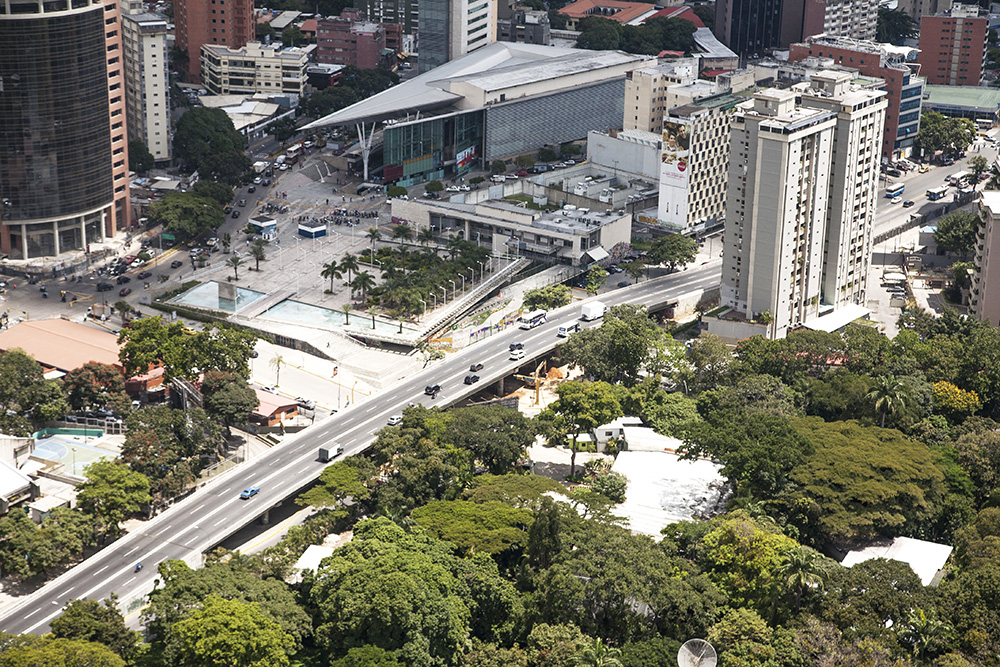 DosCaminos